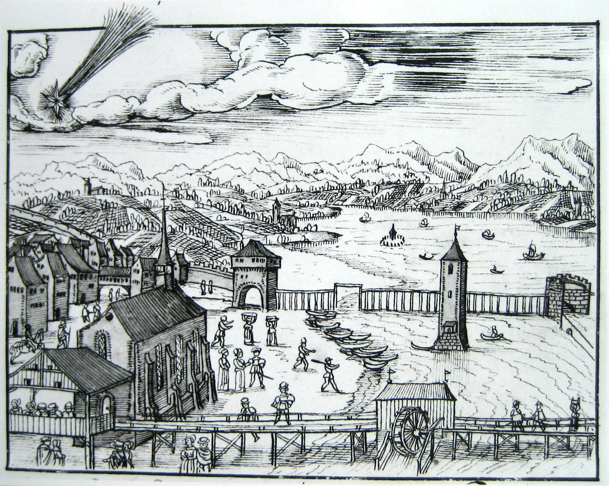 Zürich in der Schweizer Chronik von Christoph Silberysen, Bd. 1, S. 455 (1576). Während der extremen Trockenheit im Jahr 1400 konnte die Wasserkircheninsel trockenen Fusses umgangen werden. Für die Ursache hielt man den Kometen. Die Darstellung zeigt die Gebäude und Bauwerke - u.a. Wellenberg, Grendeltor und vermutlich der Vorgängerbau des Bauschänzlis - jedoch im Zustand des 16. Jahrhunderts. Im Hintergrund sind die Überreste des römischen Rundtempels auf dem Grossen Hafner zu erkennen.